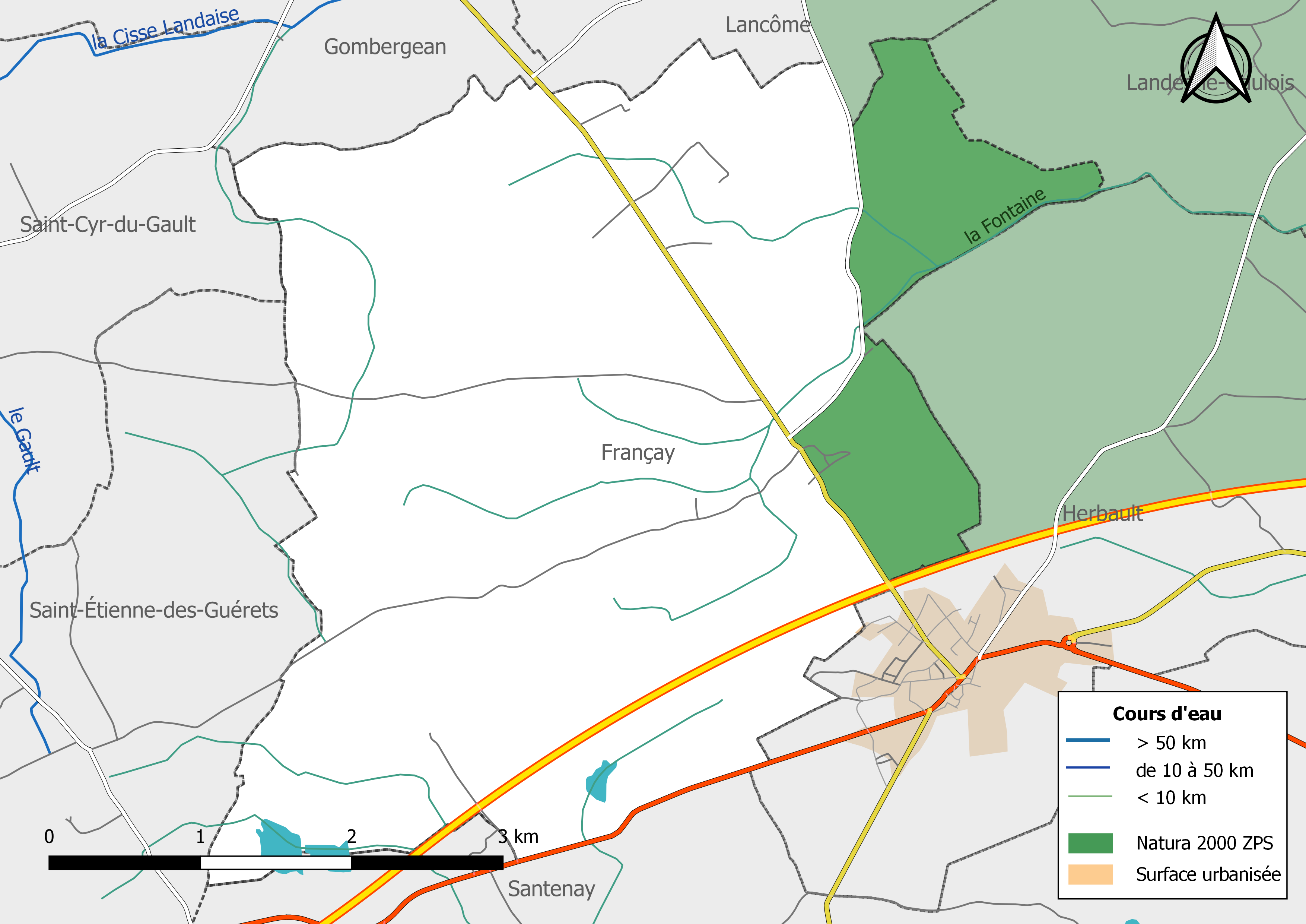 Carte des zones Natura 2000 de type ZPS de la commune de Françay (France).